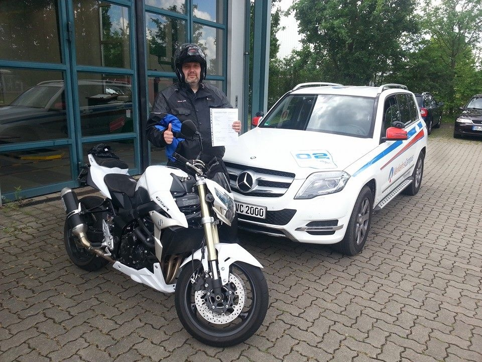 Fahrlehrerausbildung in Dresden